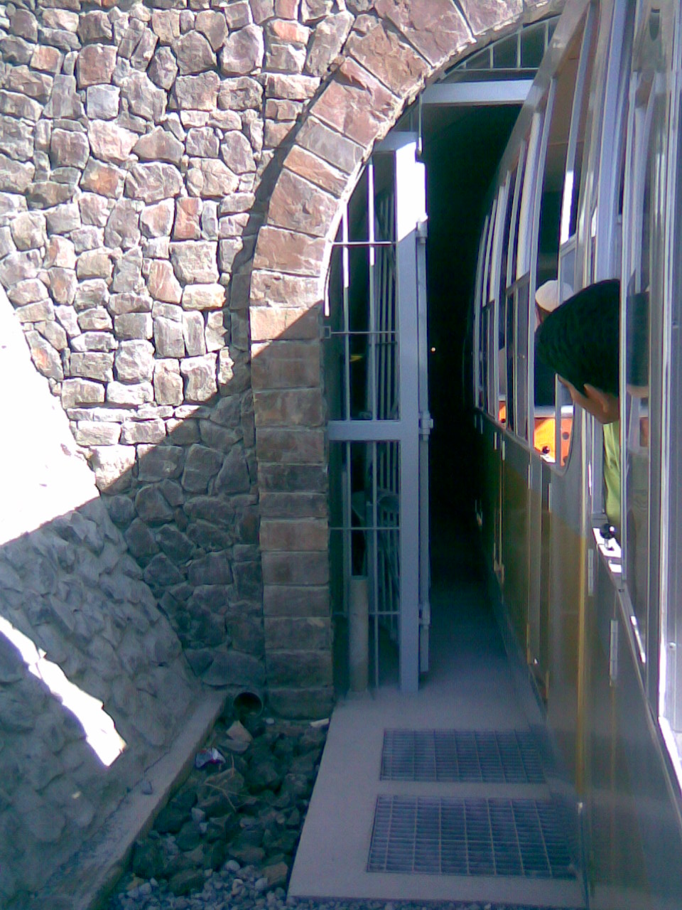 صورة من القطار للمدخل الاصطناعي لكهف الهوته بولاية الحمراء بالمنطقة الداخلية بسلطنة عمان - أخذت الصورة في 5 يناير 2007 الصورة من إنتاج مستخدم:محمد نبيه this is the entrance of Hoota cave - Al hamra - Al Dakhlia region - Sultanate of Oman - 5th January 2007 Image taken by User:Nabieh